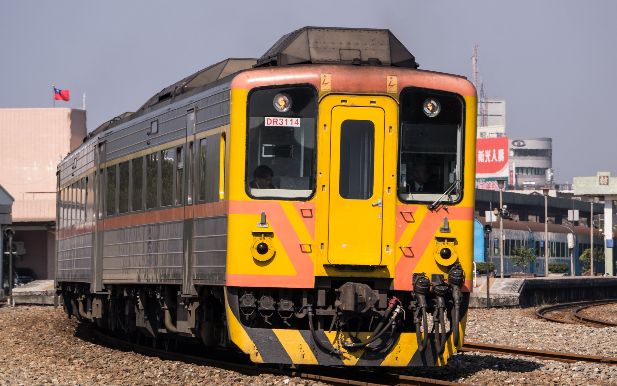 臺灣鐵路管理局第371車次自強號（DR3100）逆行南迴線，駛離枋寮車站。